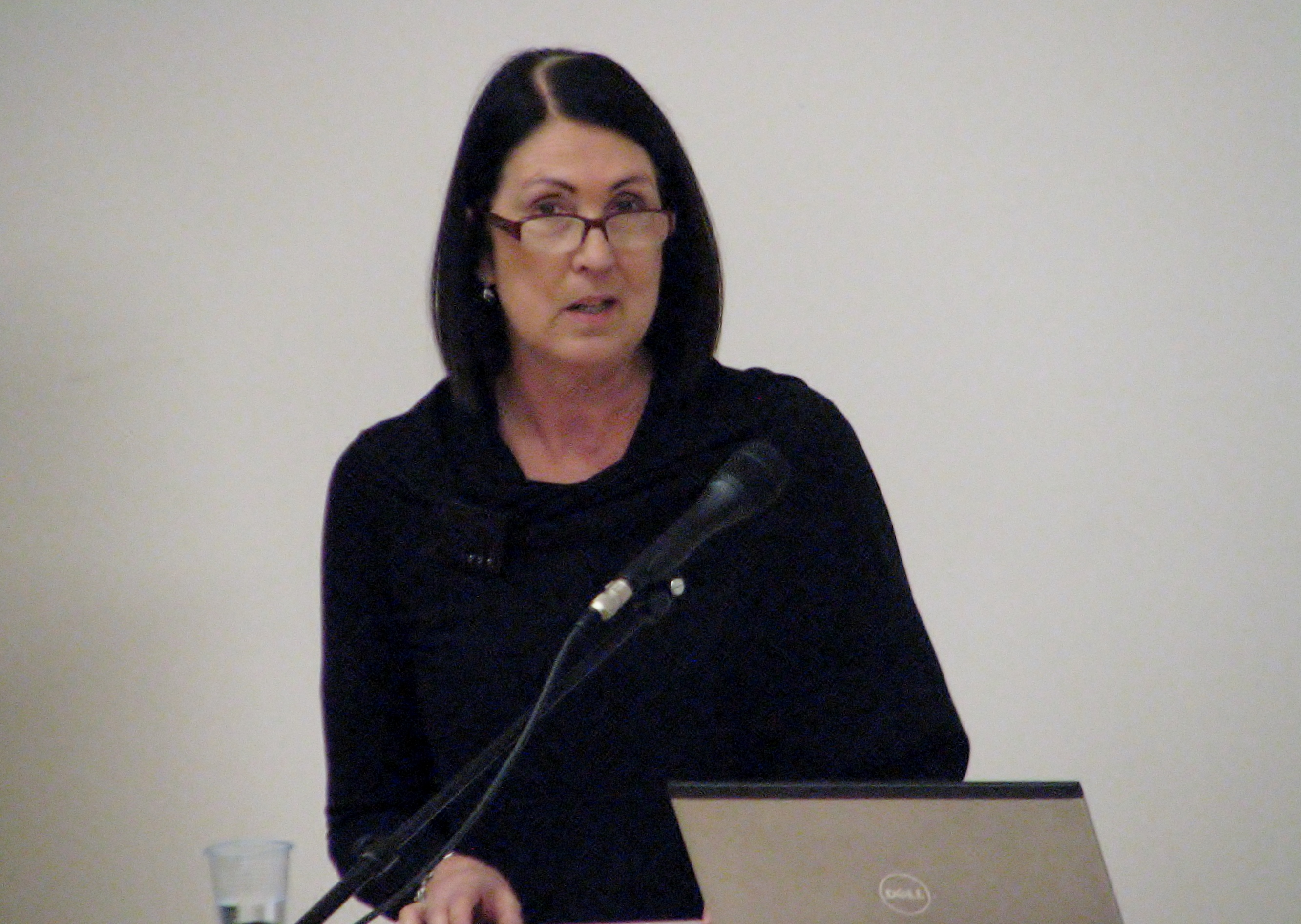 Krista Kodres esinemas Tallinna Ülikoolis toimunud konverentsil "Eesti humanitaarne tulevik"